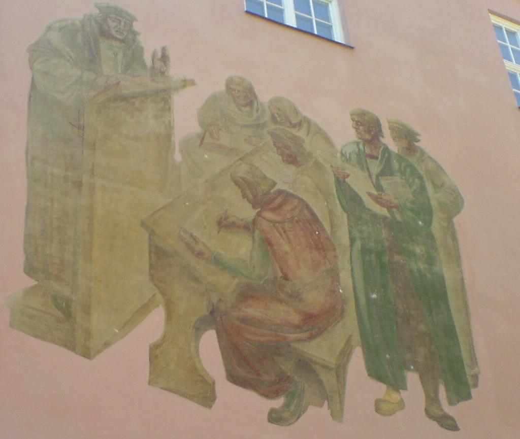 Fresko an der Außenseite der Hohen Schule